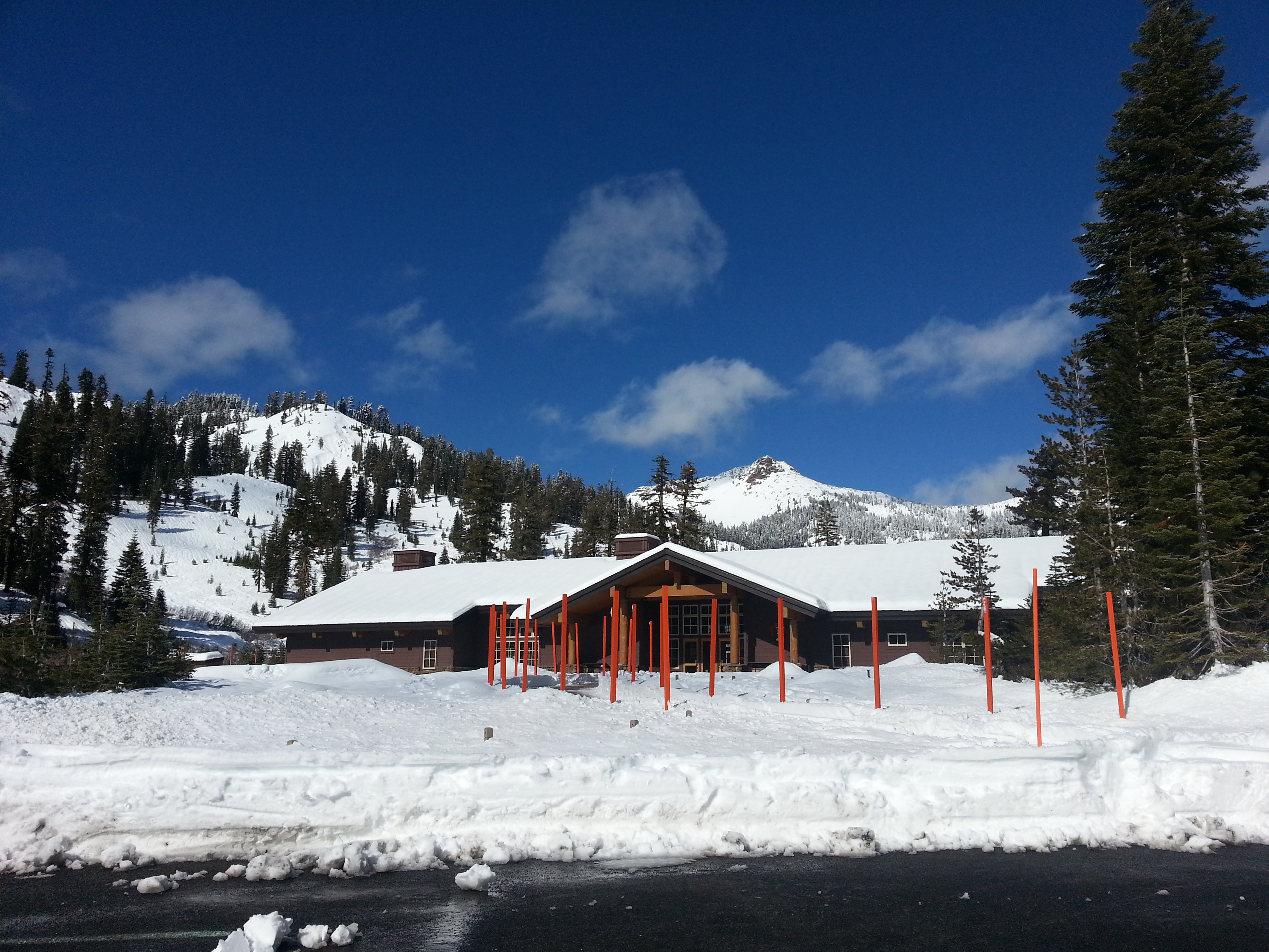 Kohm Yah-mah-nee Visitor Center